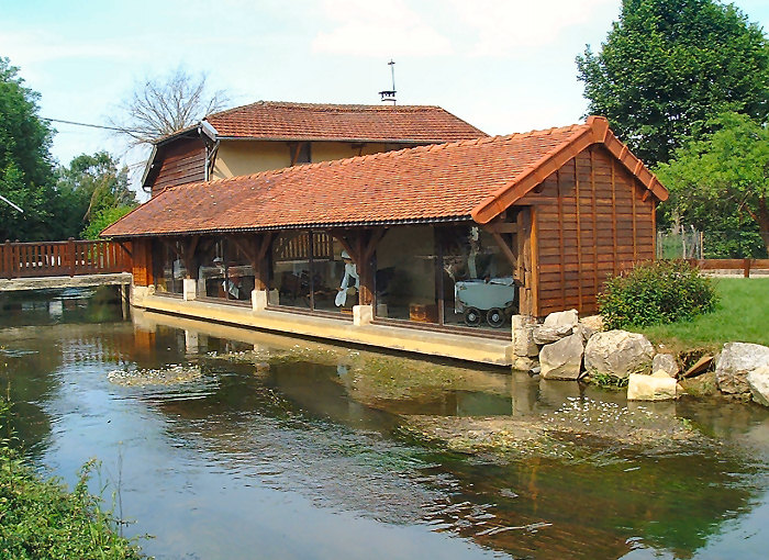 Le Lavoir-Musée de LOUVEMONT